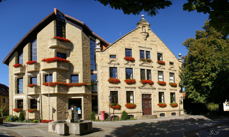 Rathaus Oestringen